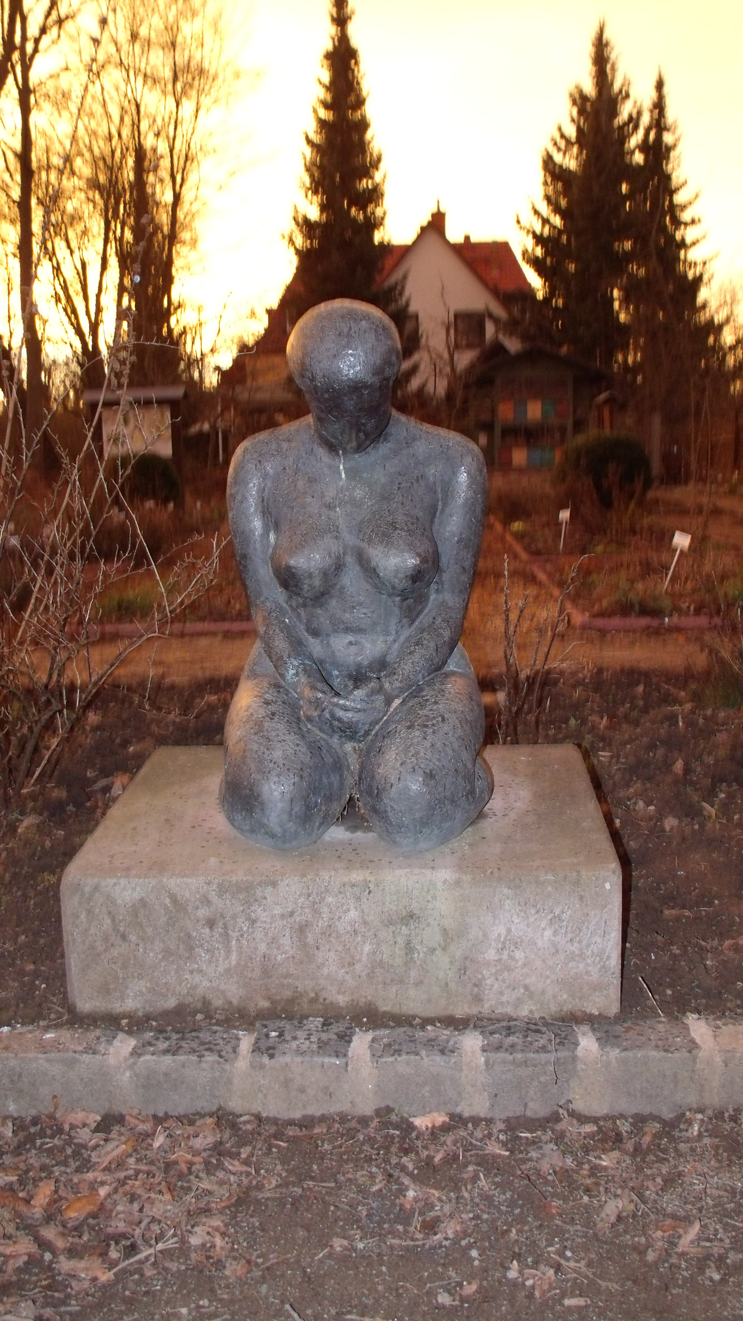 Name: Bewahrende; Standort: Hof des Deutschen Bienenmuseums Weimar; Material: Bronze; Jahr: 1990; Künstler: Winfried Kirches (aka Kirches-Ban.de)